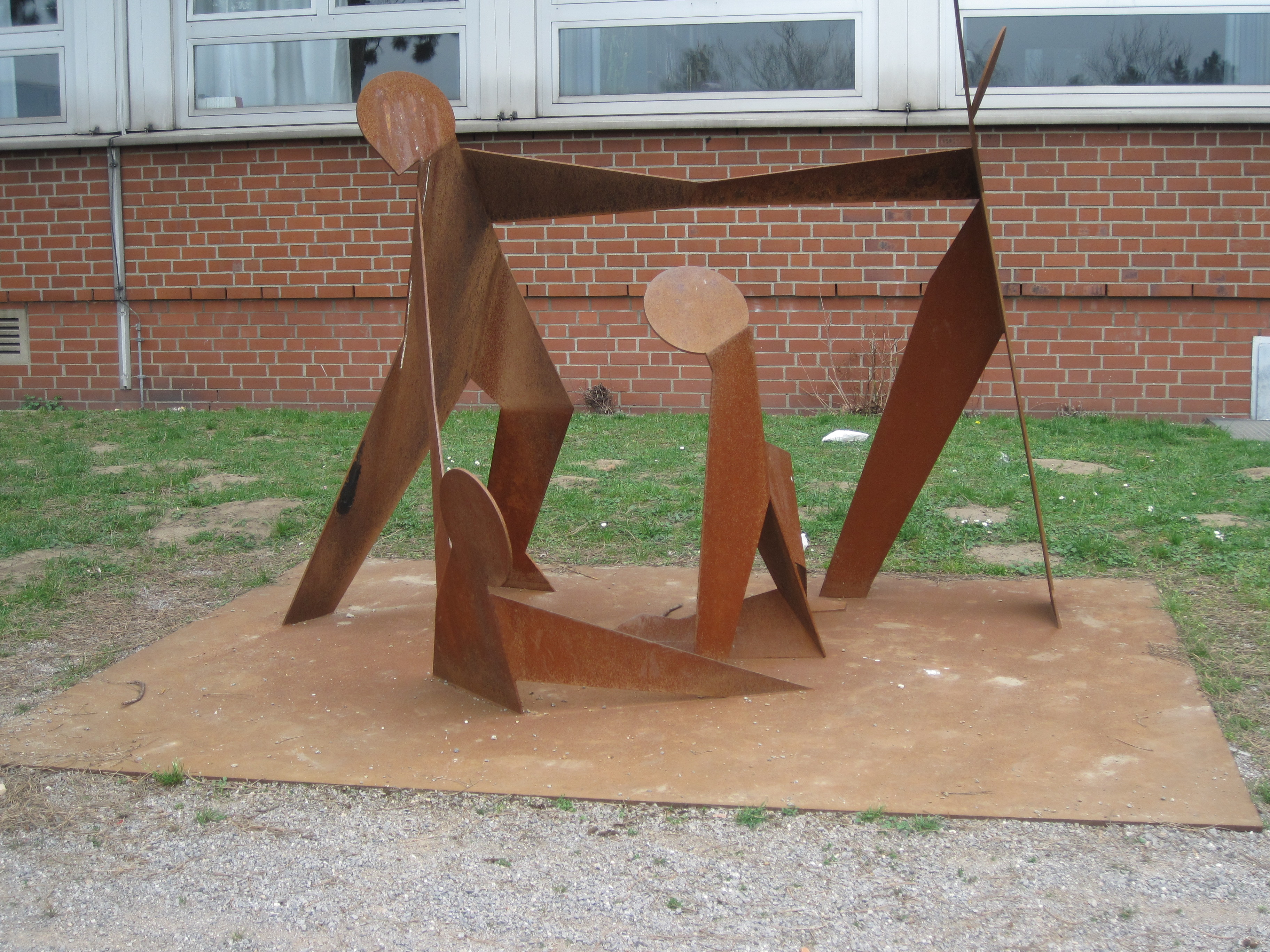 Das Foto zeigt eine Skultpur auf dem Schulhof des Galilei-Gymnasiums Hamm.